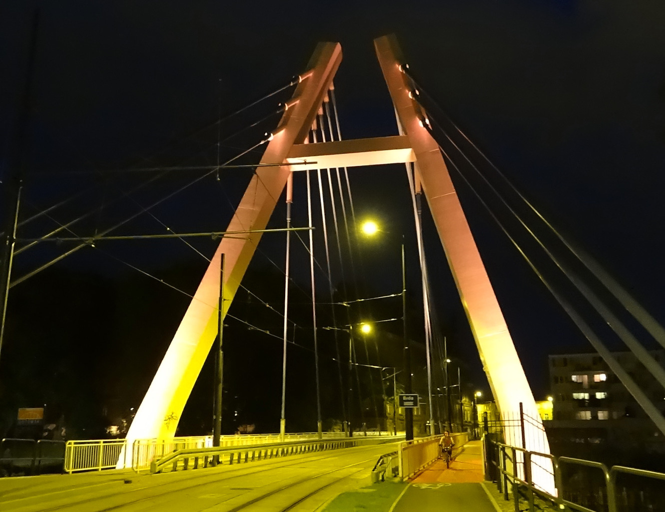 Most tramwajowy im. Władysława Jagiełły nad Brdą w Bydgoszczy